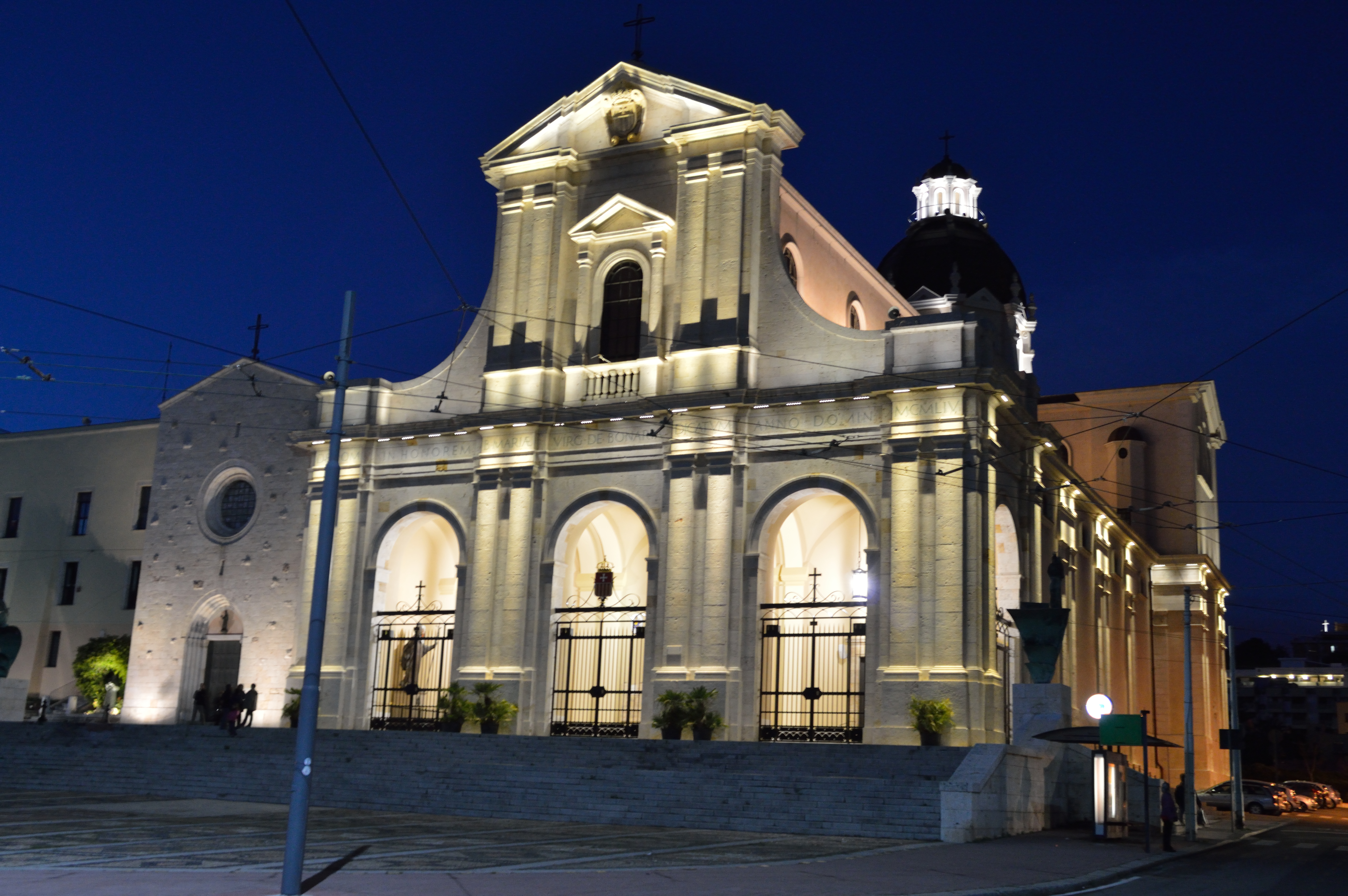 Basilica Nostra Signora di Bonaria This is a photo of a monument which is part of cultural heritage of Italy.